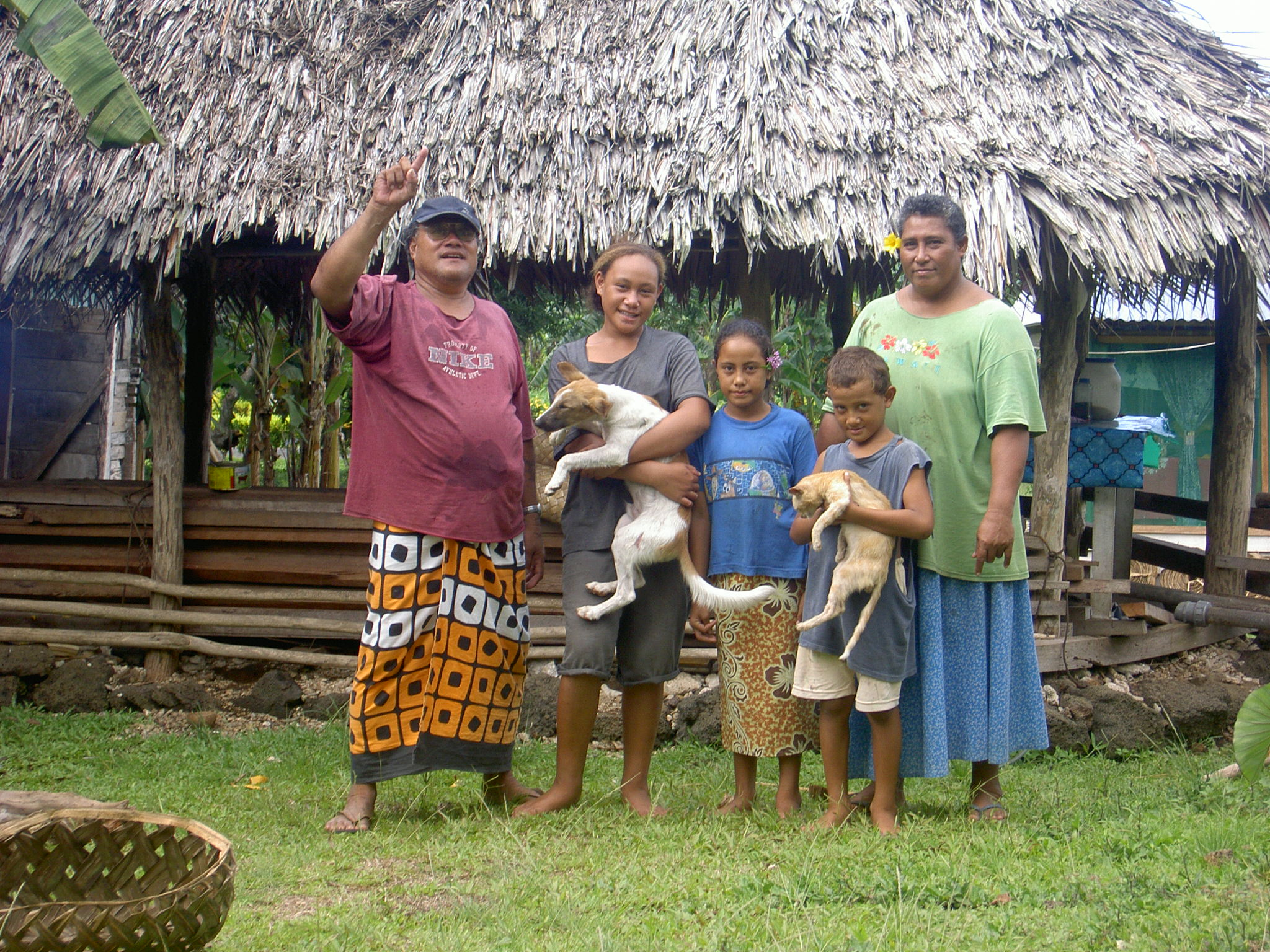 Familie vor ihrem Haus auf Samoa